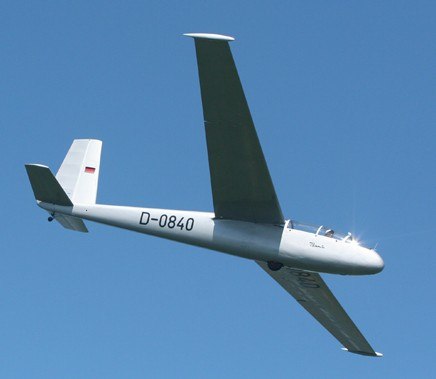 LET L-13 D-0840